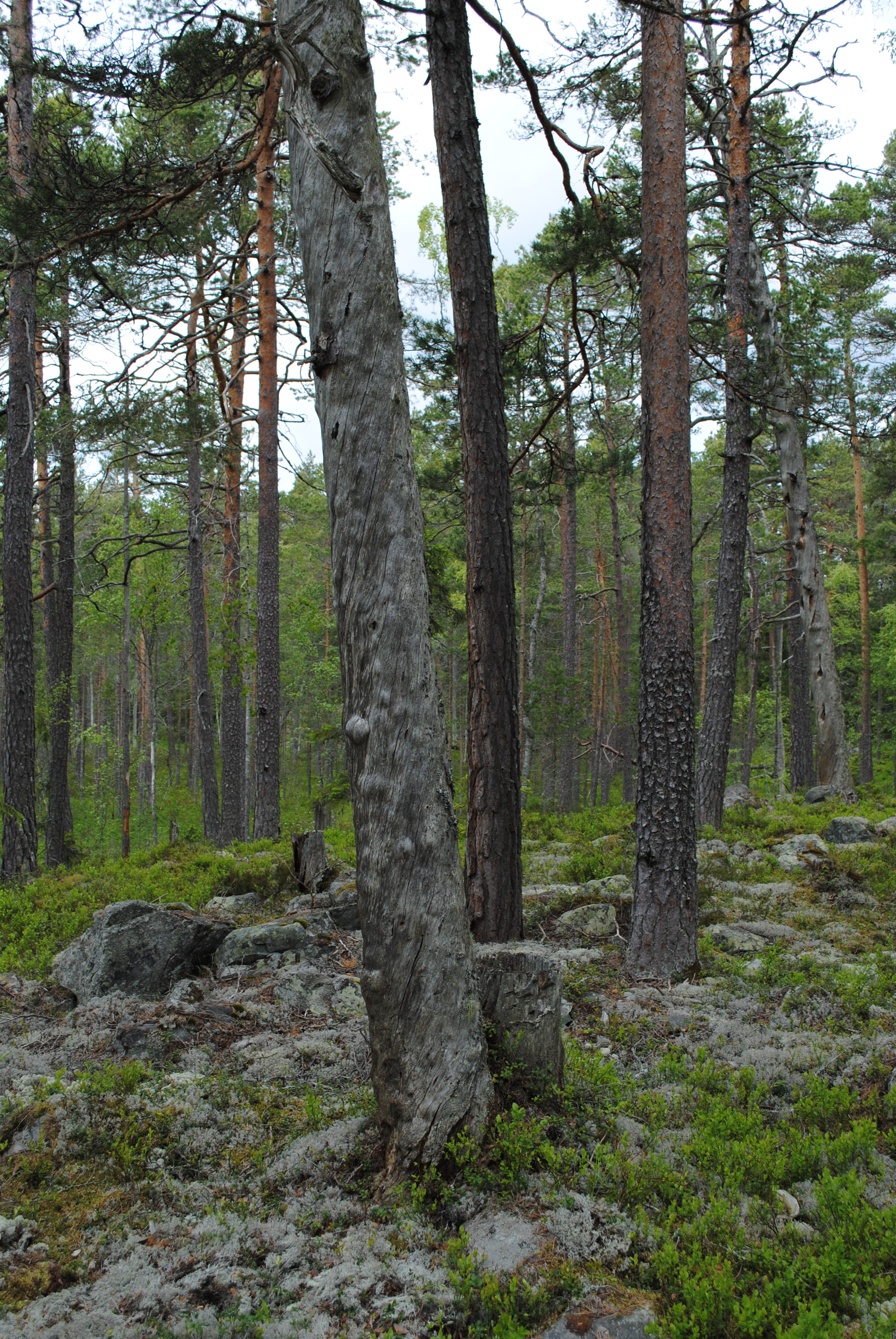 Hådells gammelskog, naturreservat i Gästrikland. Västlig Taiga